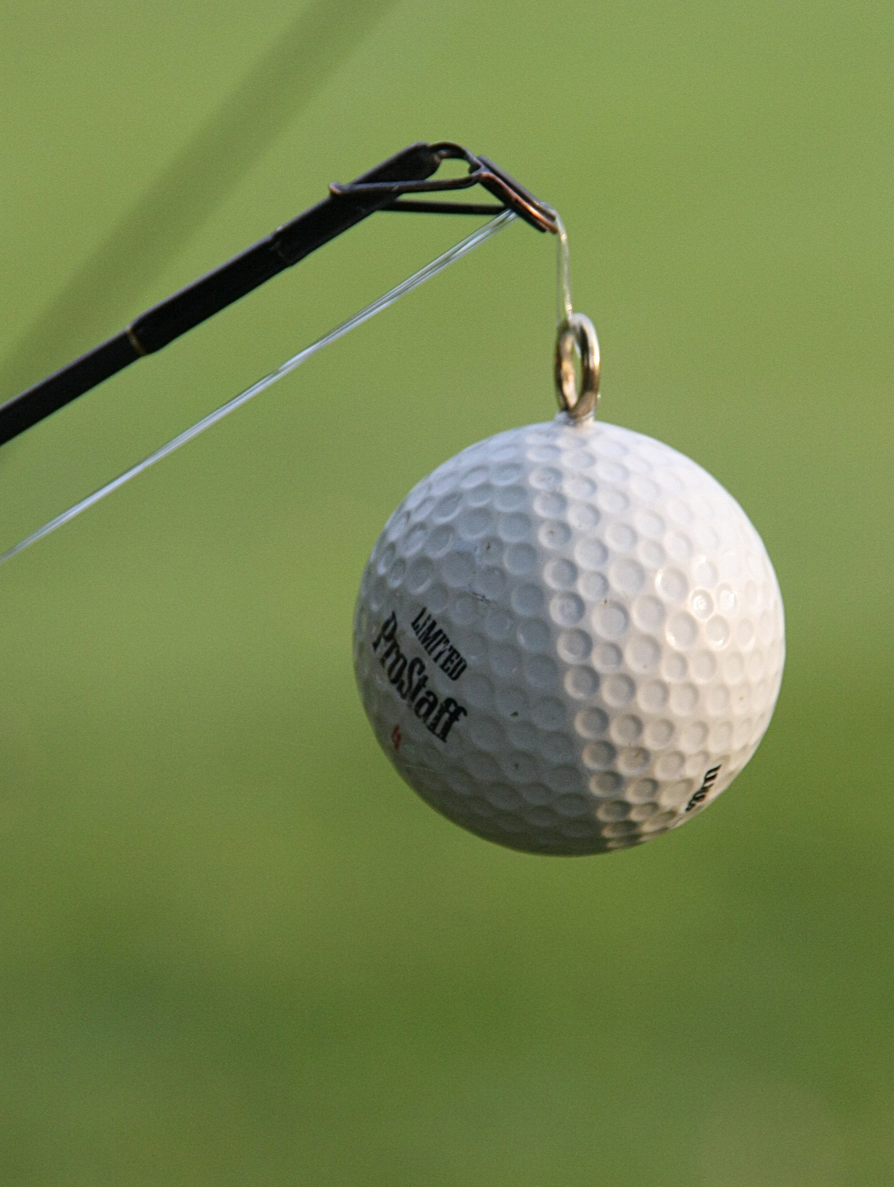 Spitze einer Angelrute mit montiertem Angelgolfball